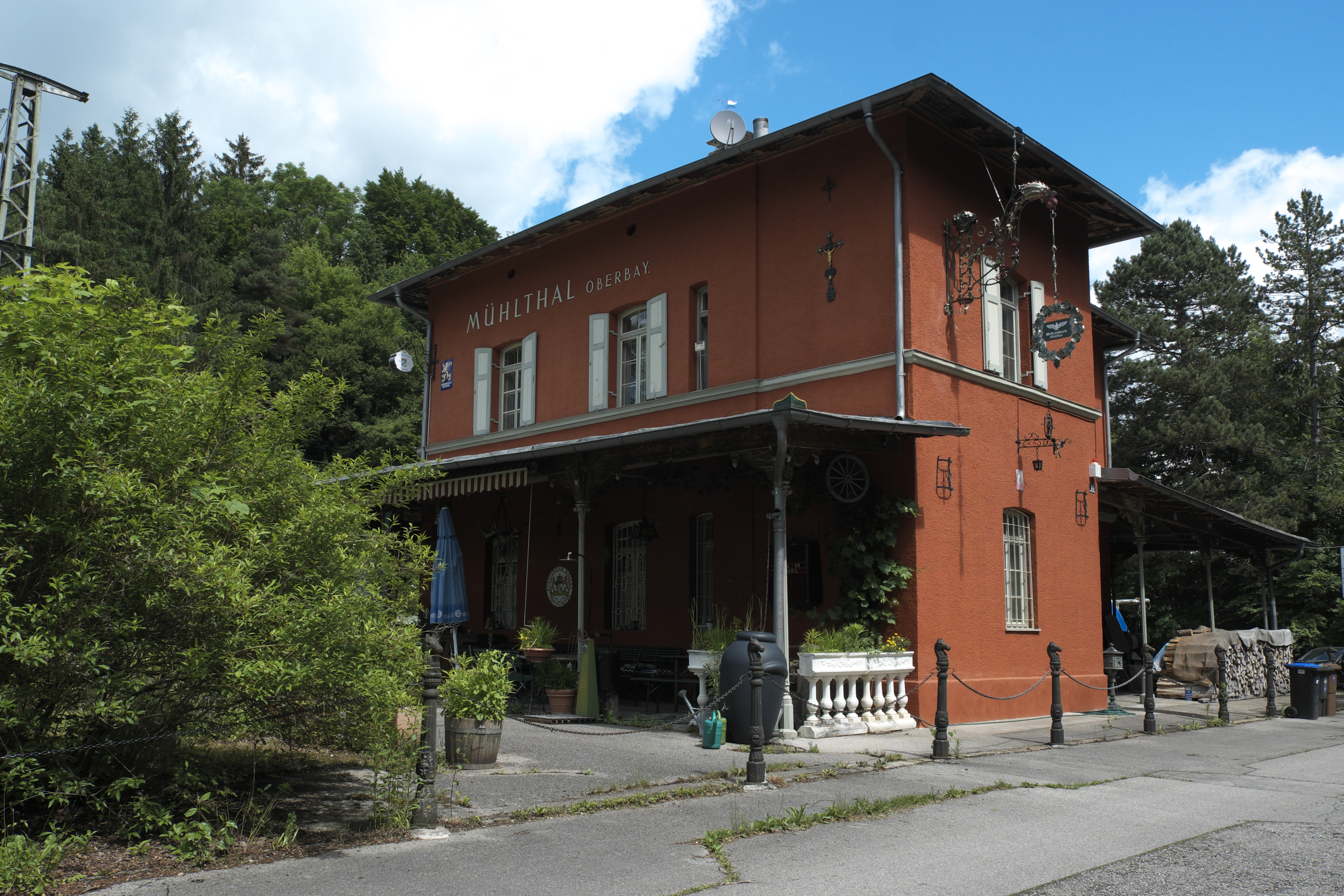 Bahnhof Mühlthal in Mühlthal in Starnberg im Landkreis Starnberg (Bayern, Deutschland)